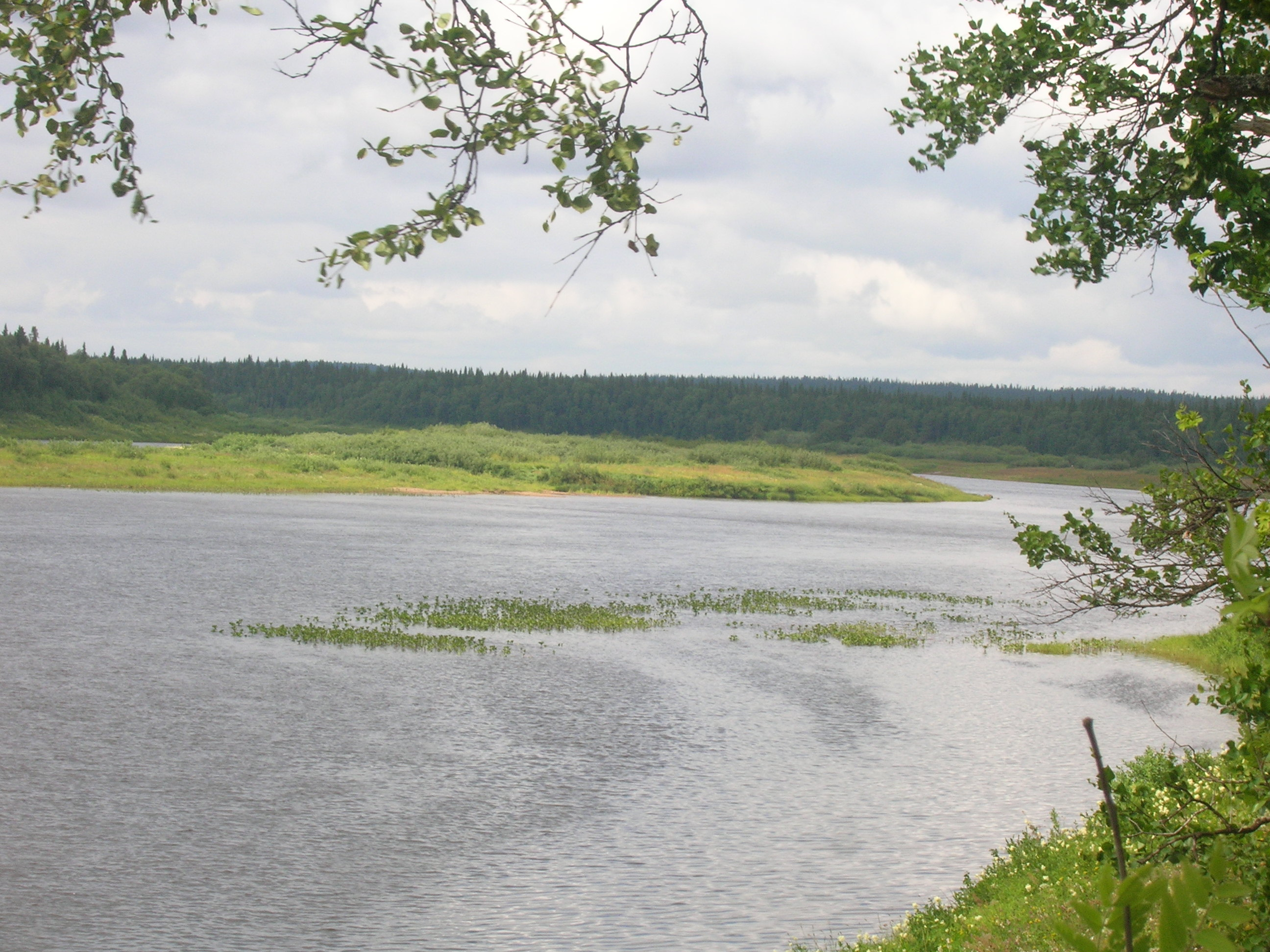 Варзуга